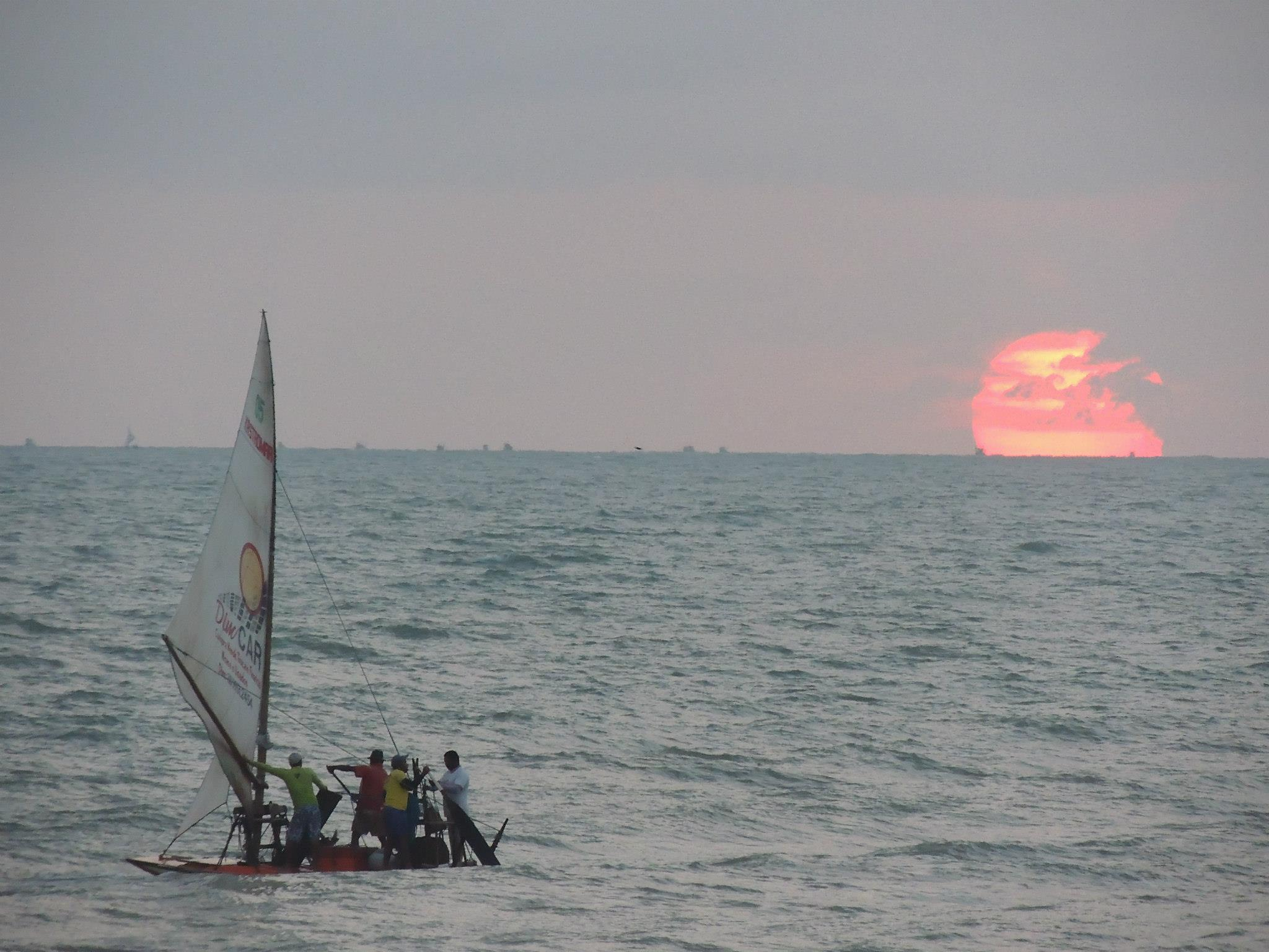 Essas fotos foram tiradas numa cidadezinha de pescador próximo a Canoa Quebrada, uma cidade que sobrevive do turismo